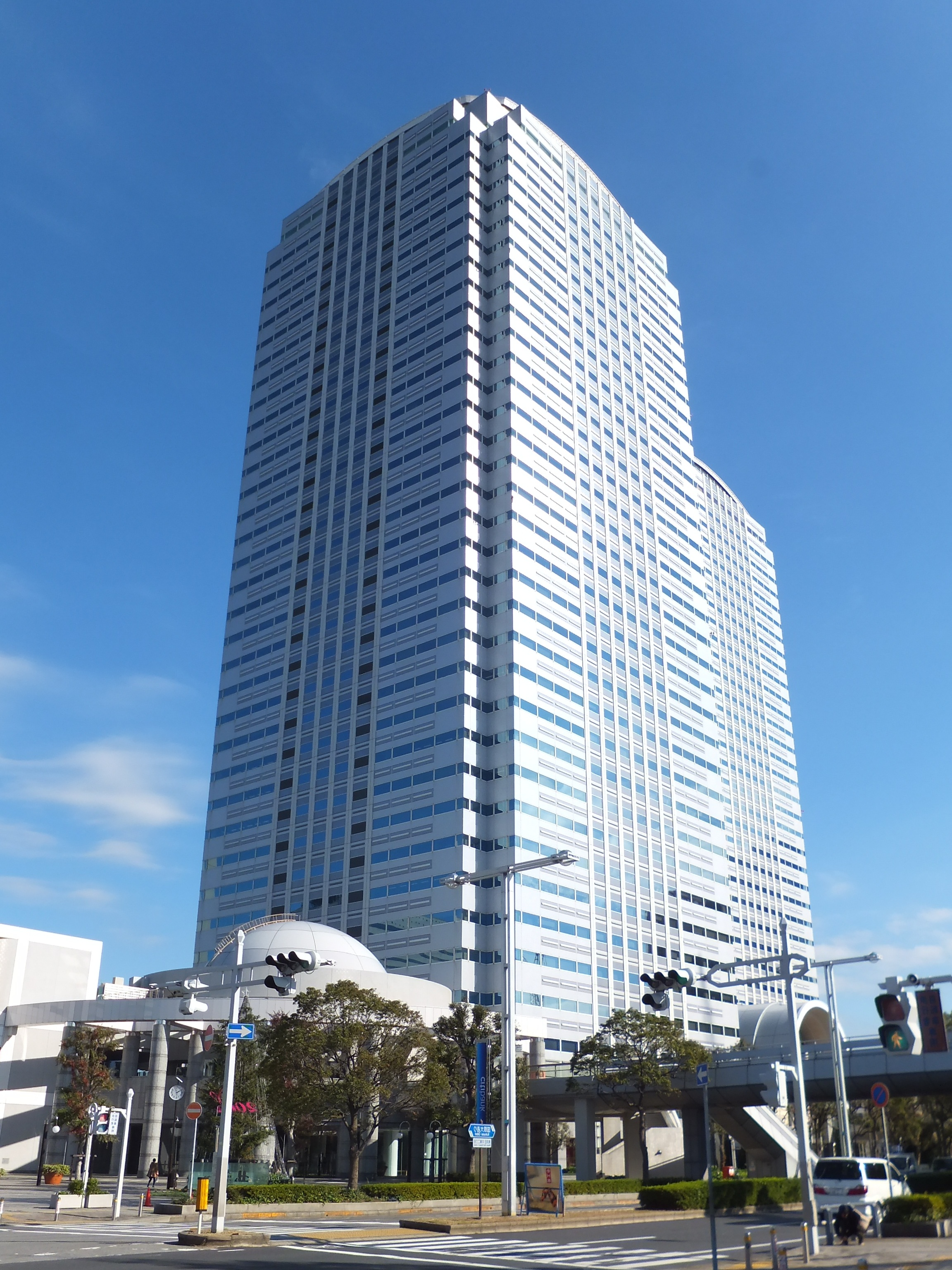 ワールドビジネスガーデン